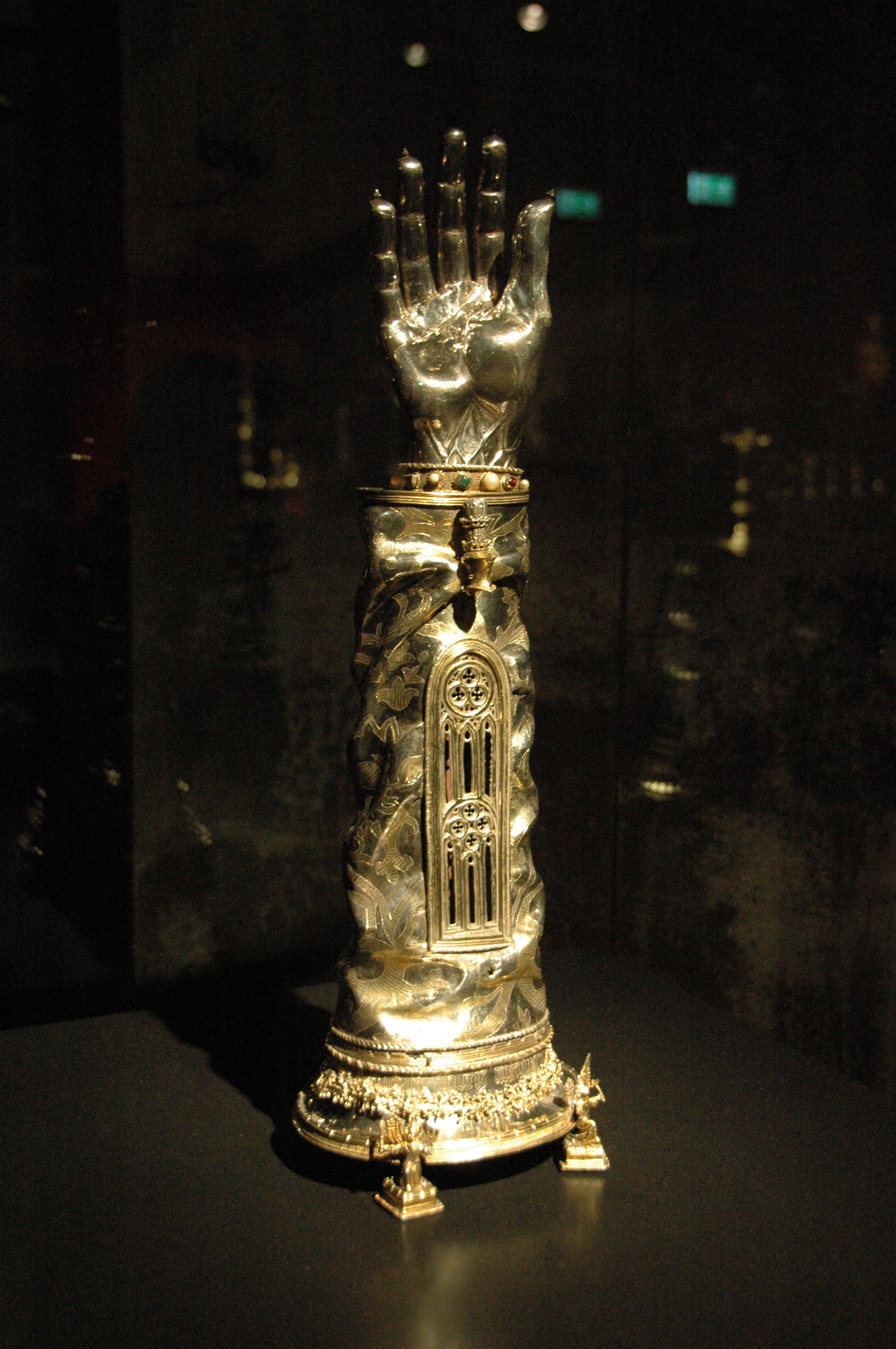 Armreliquiar des St. Quentin aus dem Essener Domschatz, gestiftet aus dem Nachlass der Essener Pröbstin Margarete von Castell